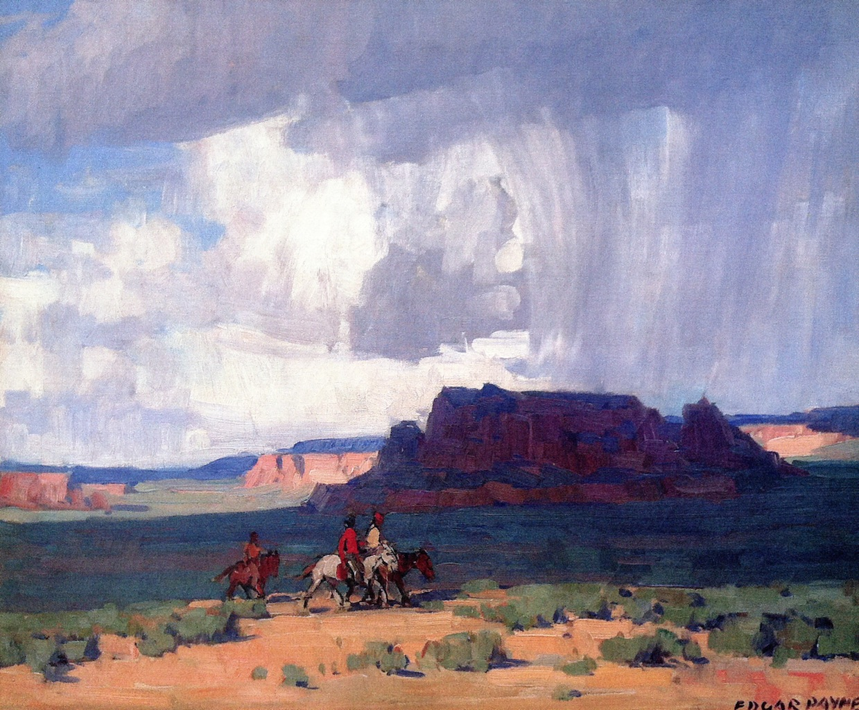 Картины Эдгара Пейна (англ. Edgar Alwin Payne; 1883—1947) — американского художника-импрессиониста